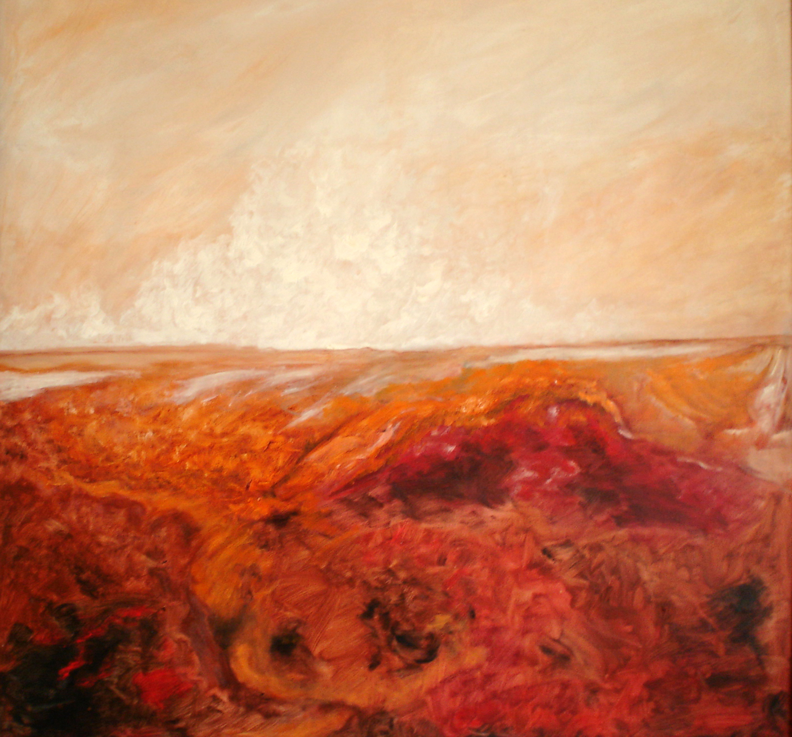 Pintura de Eugenio Cruz Vargas (1923-2014). Técnica: óleo sobre tela. Tema: abstracción total. Ya no hay elementos referenciales. Medidas: 100 x 100 cm. Esta obra sirvió como tema de portada de su último libro de poemas: “De lo terrenal a lo espacial”. Autor de la fotografía: José Cruz. La publicación de esta fotografía en internet está consentida por el propietario titular de los derechos de autor de la misma bajo las condiciones que establece la Licencia de Uso Creative Commons, Atribución-Compartigual 3.0 Unported (CC BY-SA 3.0).